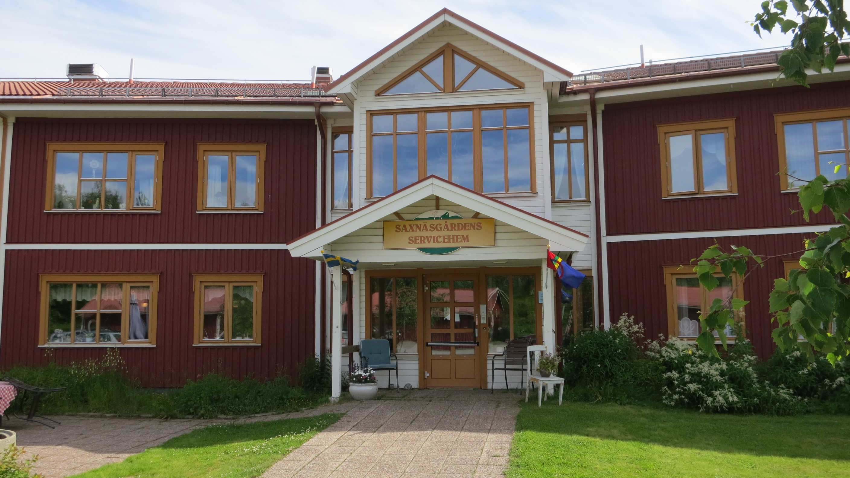 Saxnäs äldreboende